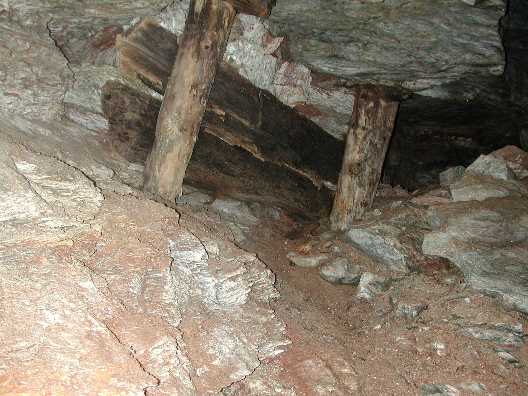 Historisches Eisenbergwerk in Wattenberg Tirol